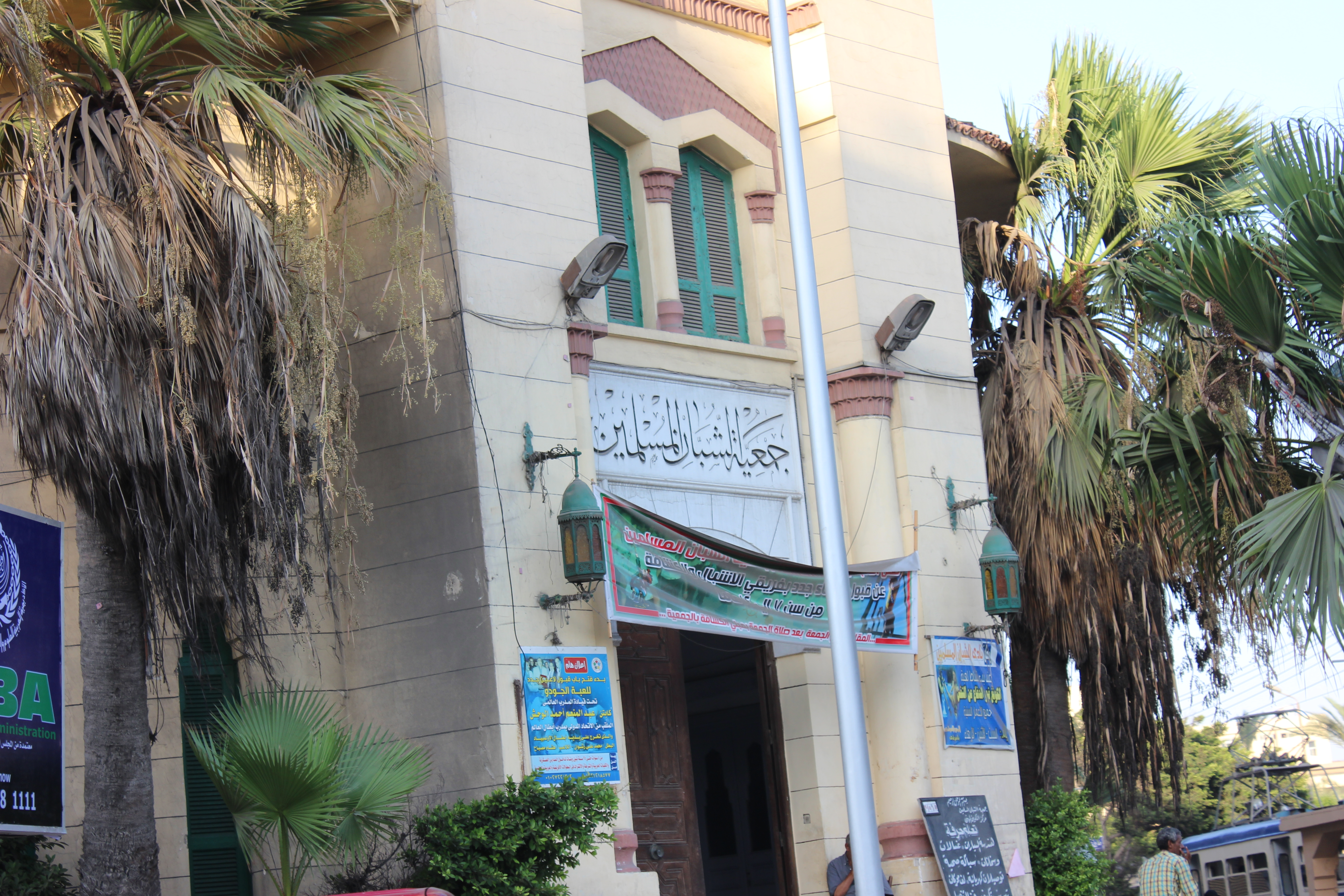 مباني الإسكندرية وبعض العلامات المميزة.